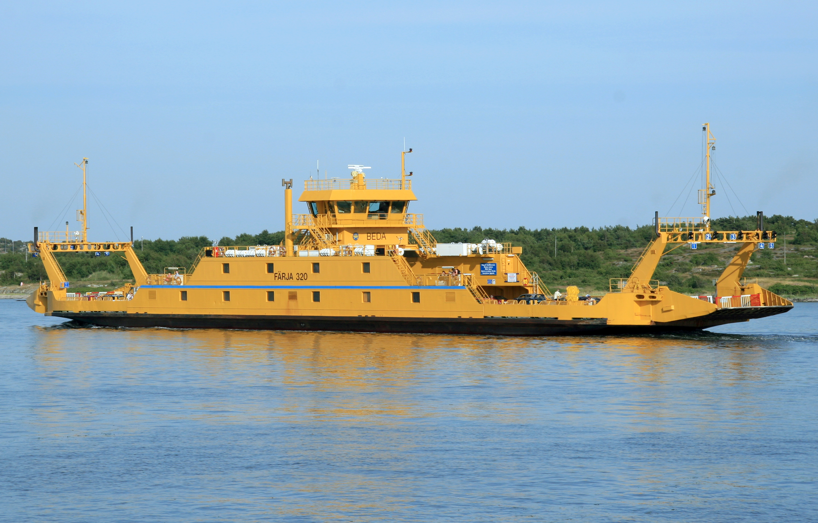 Beda på Hönöleden 5 juli 2006.